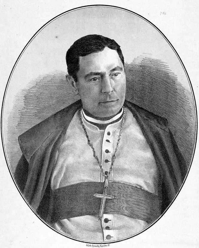 Litografía de Fray Ceferino González Tuñón en su época de Arzobispo de Sevilla